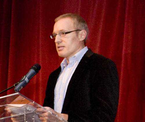 Josep Pastells, durant la presentació del diari Al Cabo de La Calle a Getafe